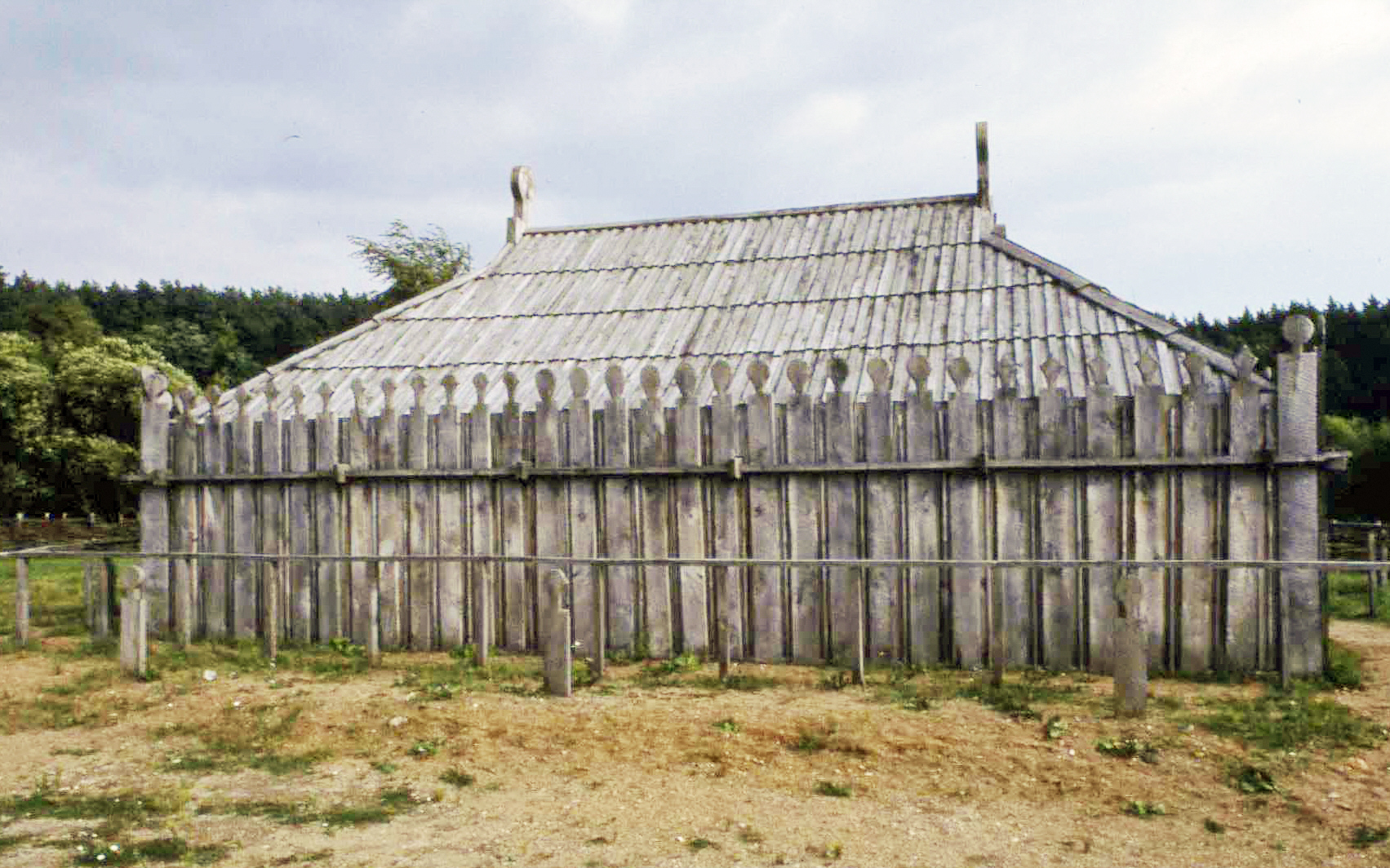 Rekonstruierter slawischer Tempel aus dem 9. Jahrhundert im Archäologischen Freilichtmuseum Groß-Raden